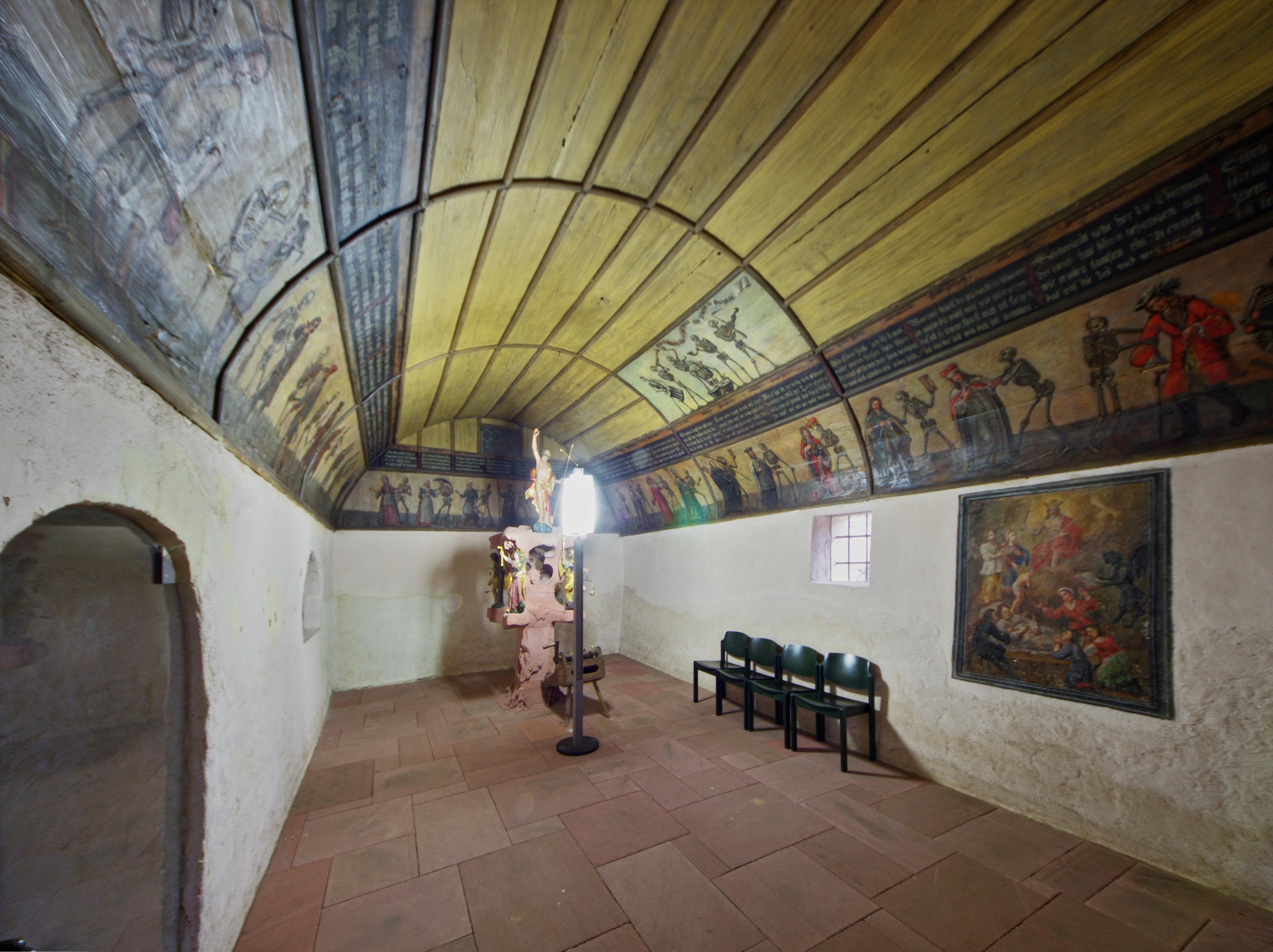 Blick in die Kapelle Ultarweitwinkelaufnahme mit fast 180° Blickwinkel